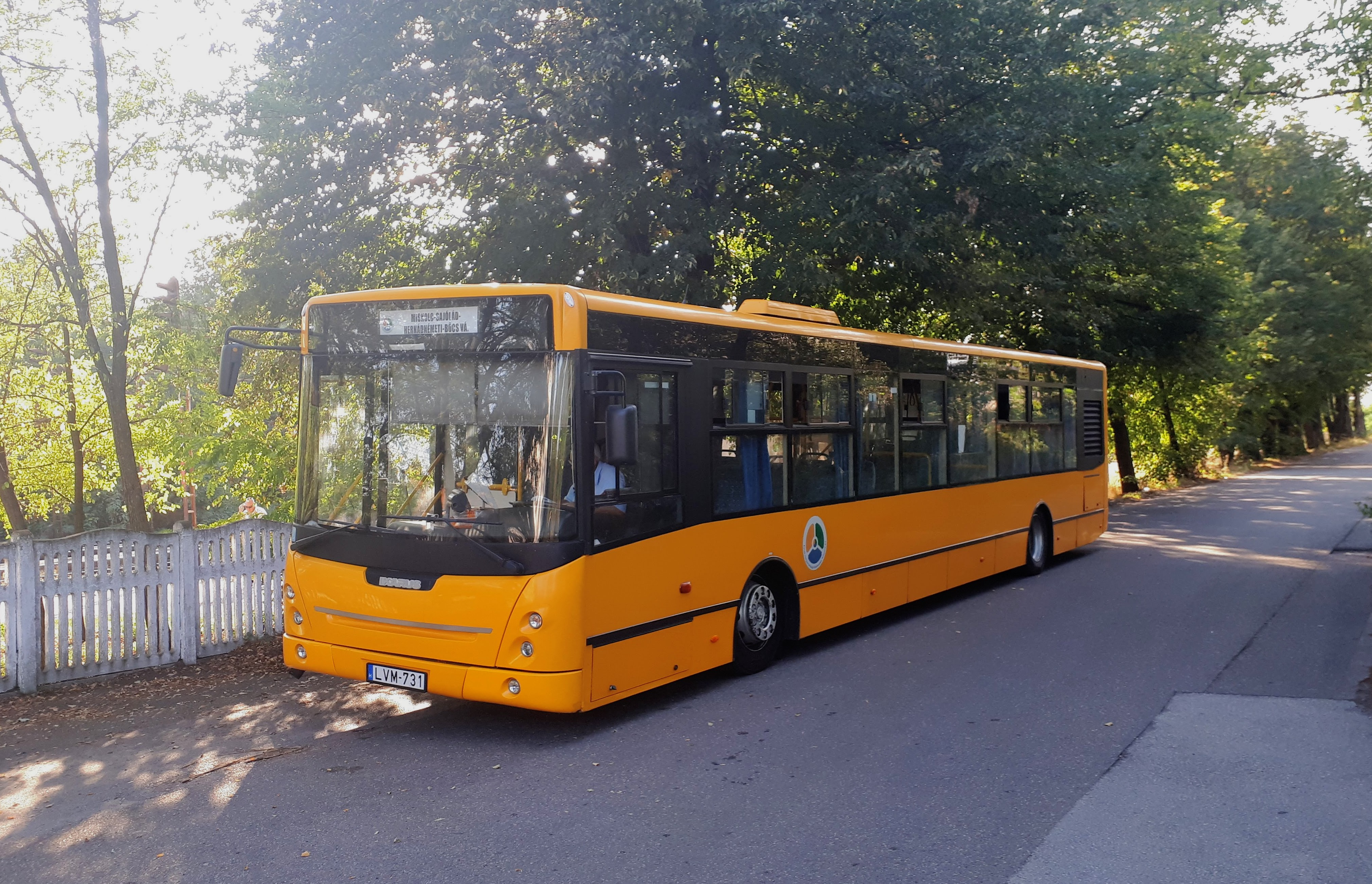 Az ÉMKK LVM-731 rendszámú Ikarus-ARC E134 típusú busza Hernádnémeti-Bőcs vasútállomáson, a 3733-as helyközi járaton.